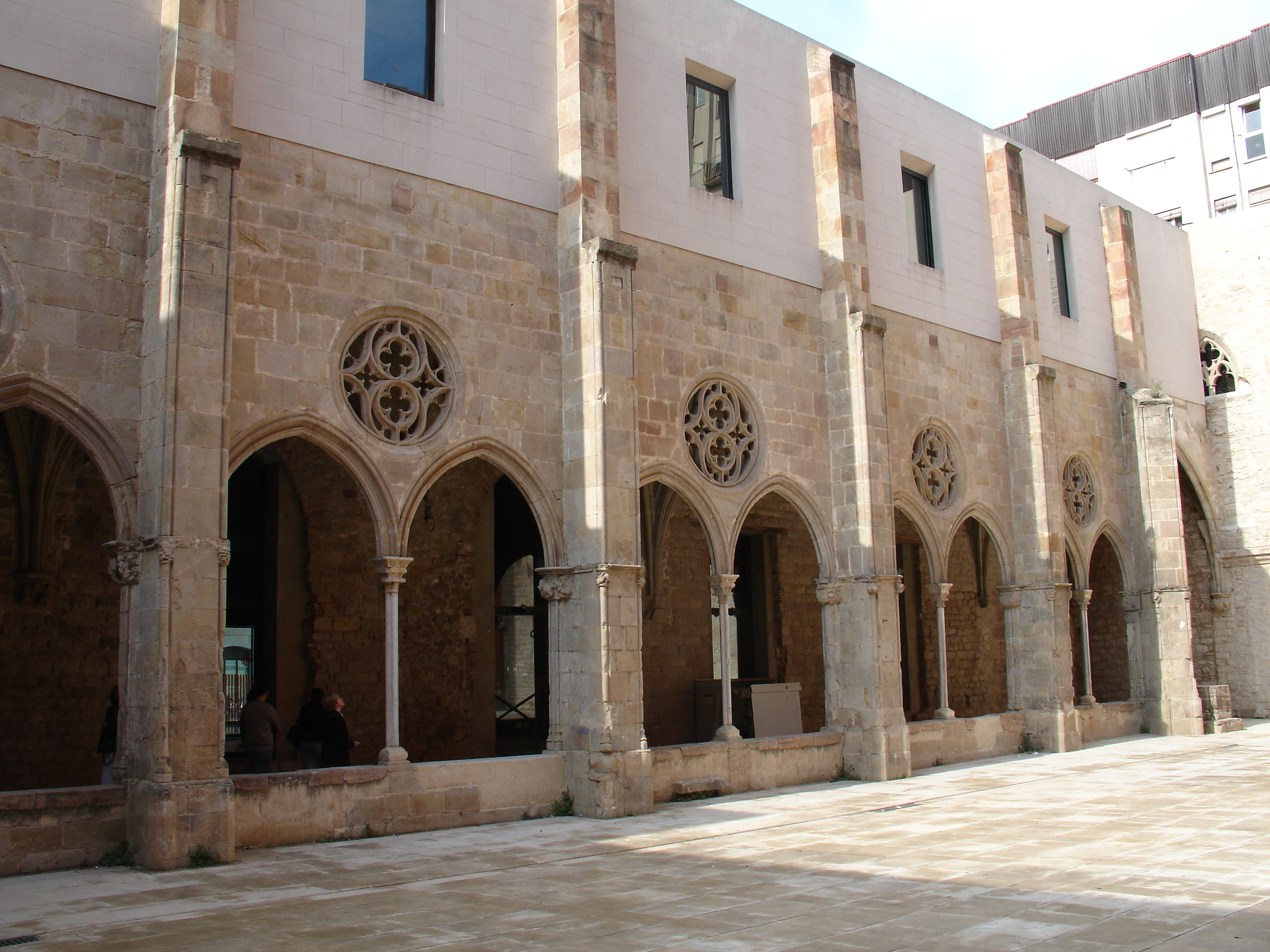 Claustre de Sant Agustí el Vell